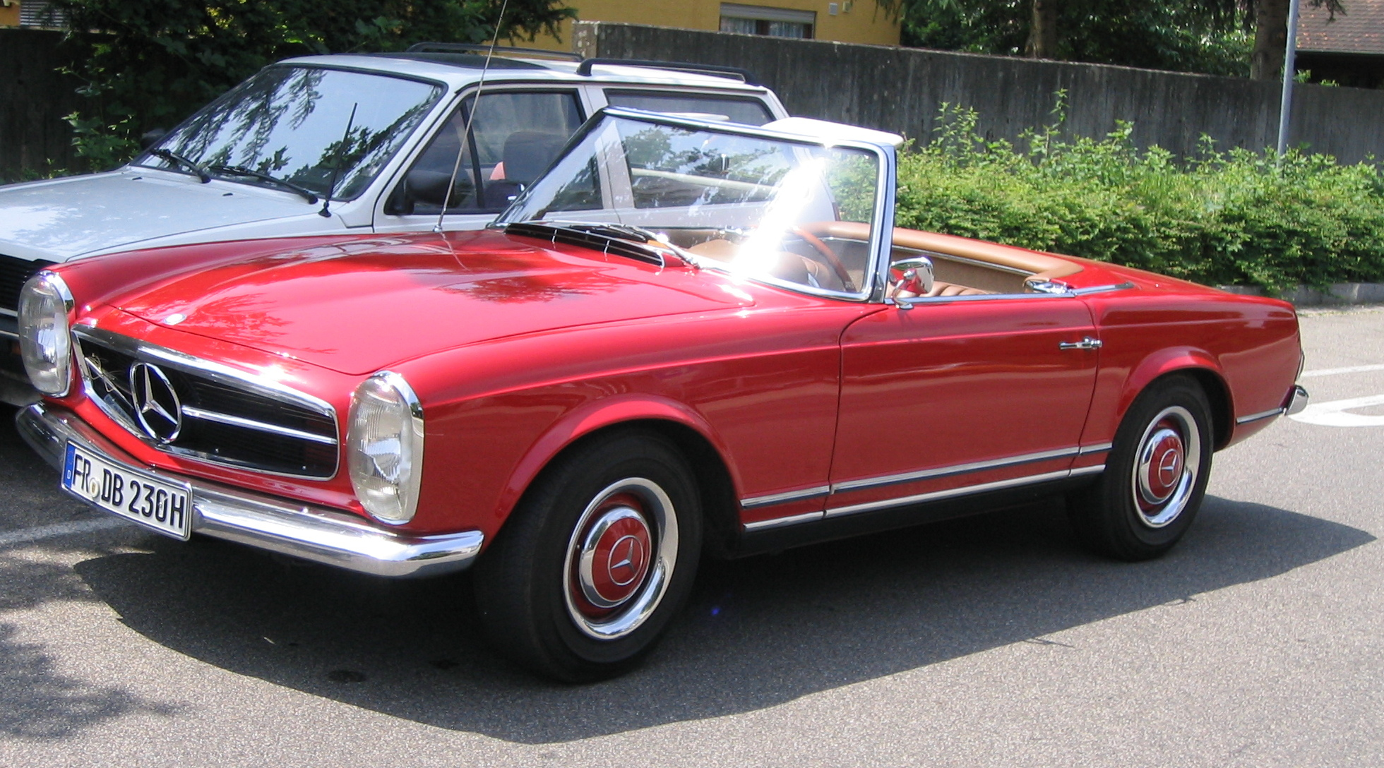 aufgenommen während eines Oldtimer-Treffens im Emmendingen, Deutschland